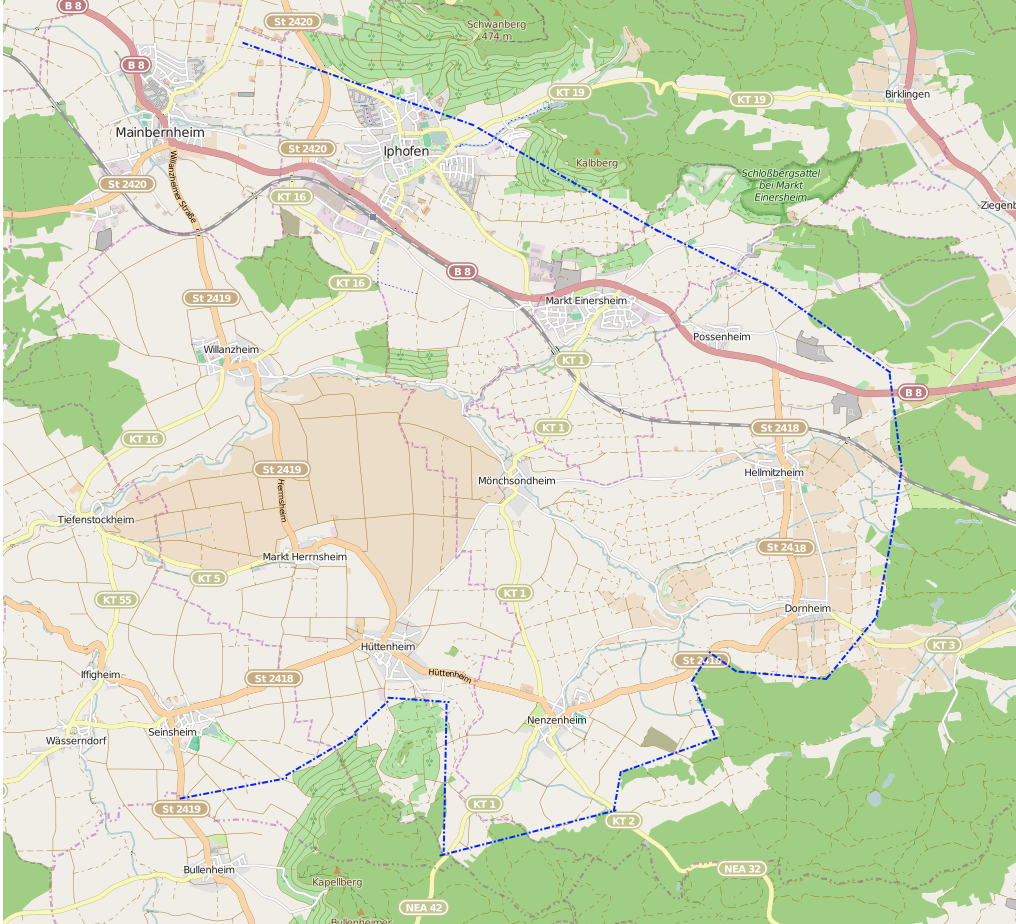 Karte der Hellmitzheimer Bucht im Steigerwaldvorland This map may be incomplete, and may contain errors. Don't rely solely on it for navigation.